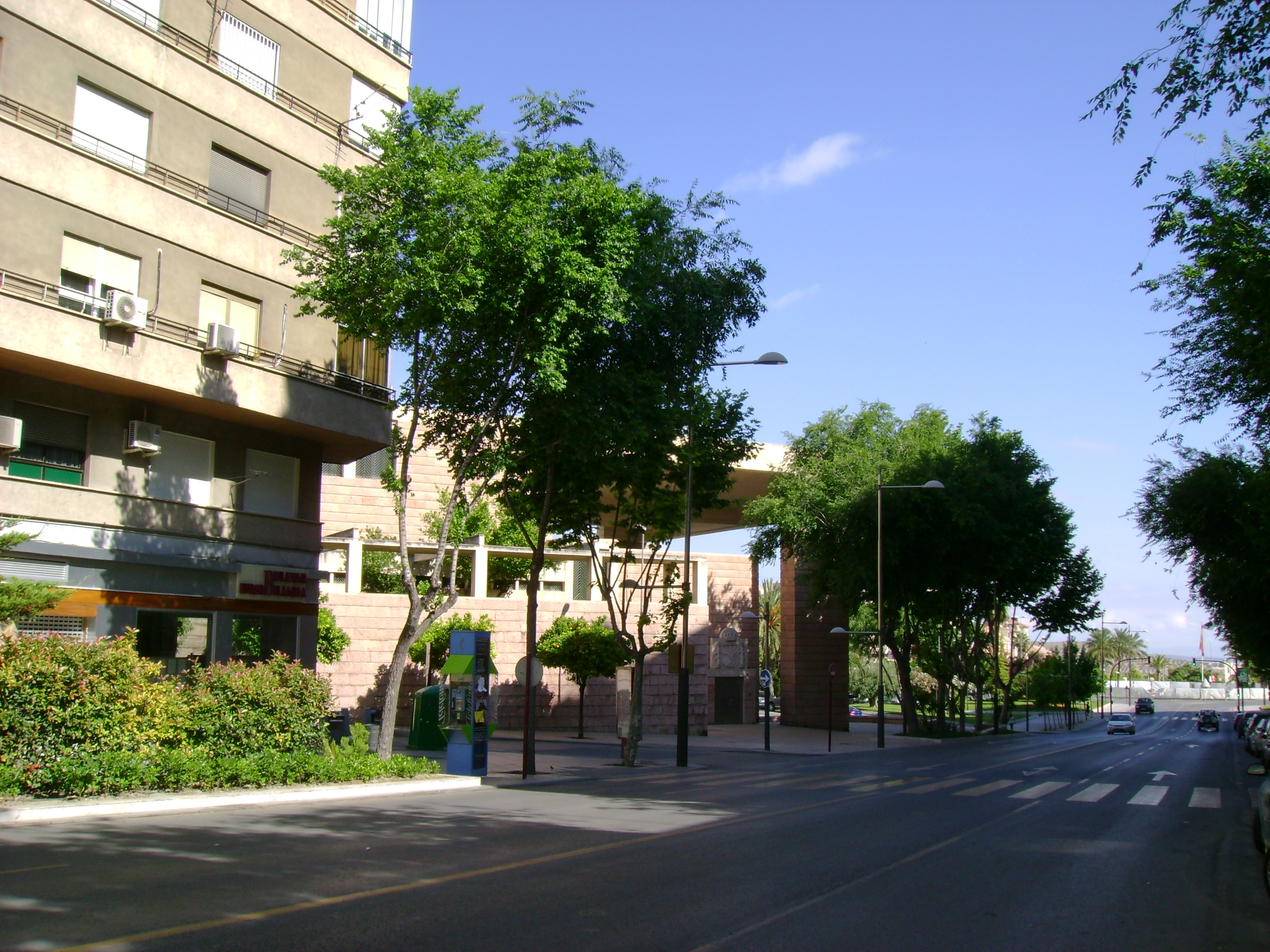 Antiguo edificio del Banco de España de Jaén, obra de Rafael Moneo. Situado en el cruce del Paseo de la Estación con la Calle de los Hermanos Pinzón. Foto hecha antes de las obras del tranvía.